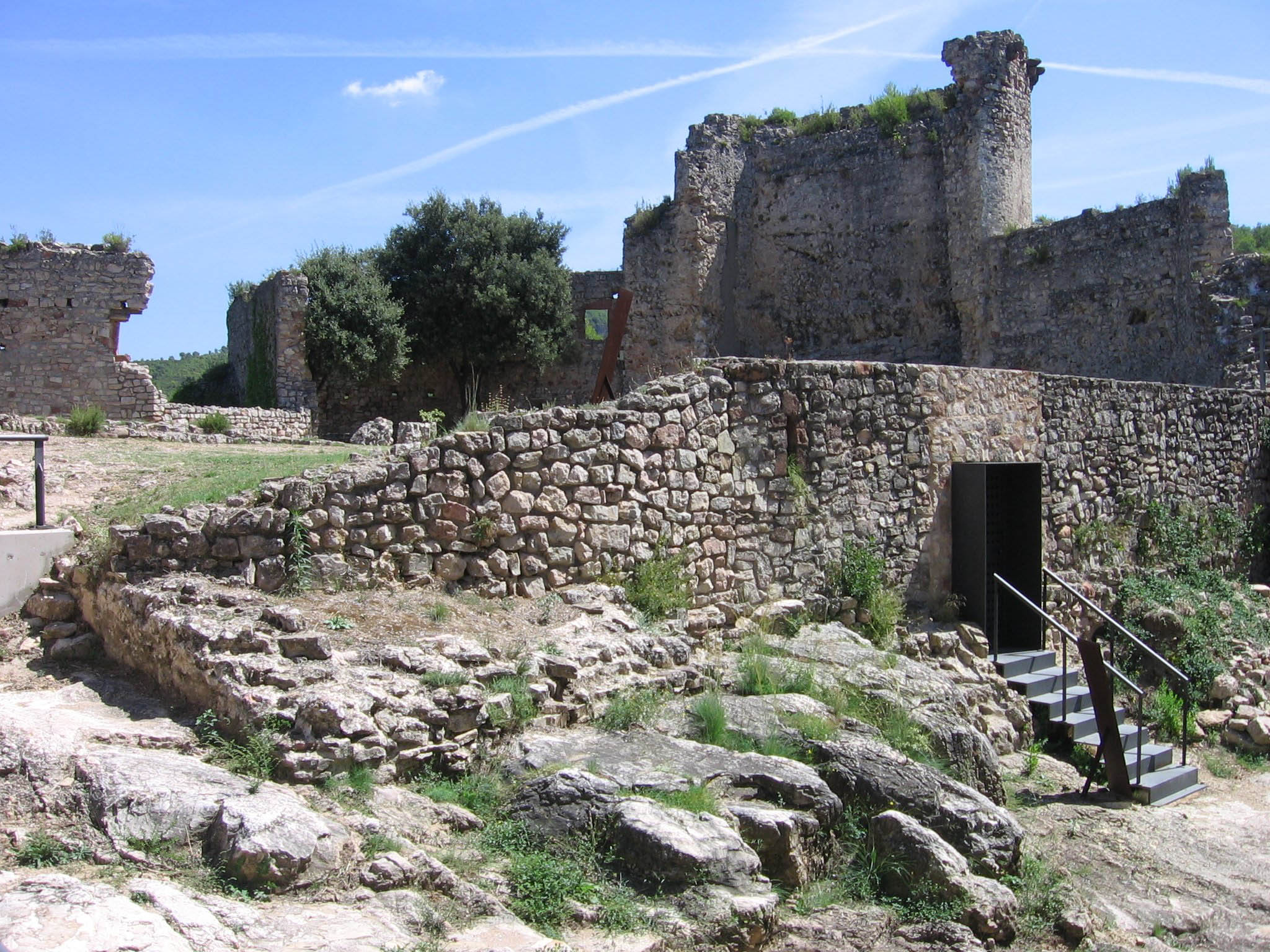 Castell de Gelida, a l'Alt Penedes